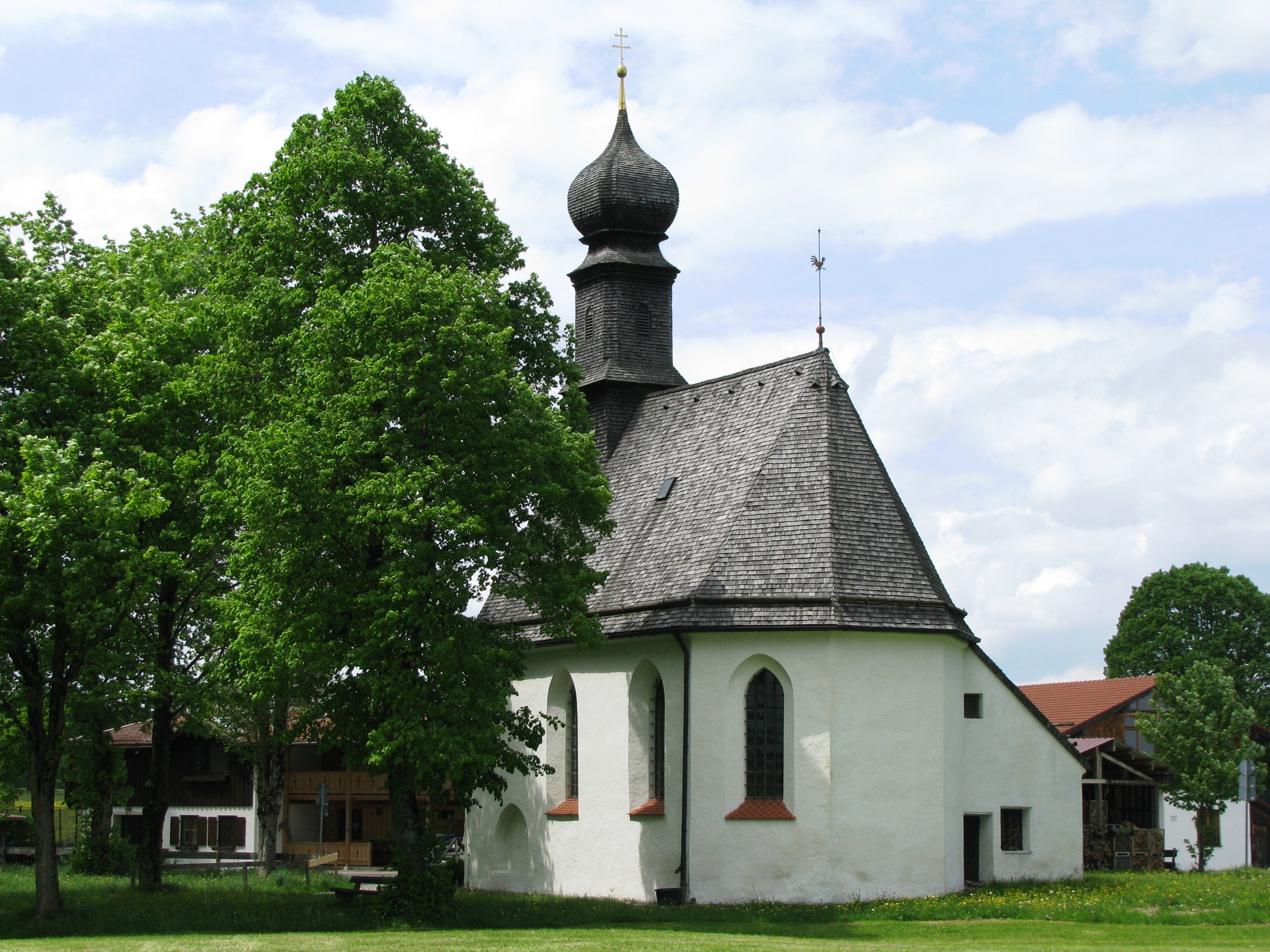 Humbach, Gemeinde Dietramszell; kath. Filialkirche St. Anna; einheitlich spätgotisch, um 1500.